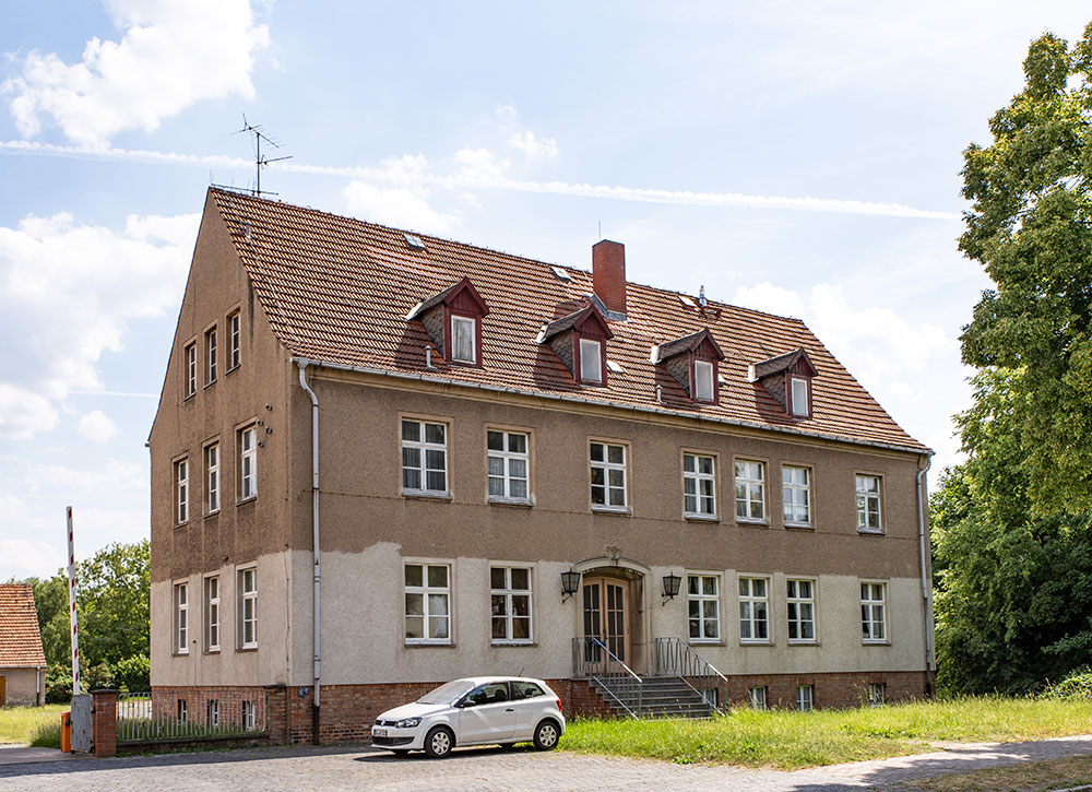 Stendal Haferbreiter Weg 20, Tierklinik, Baudenkmal